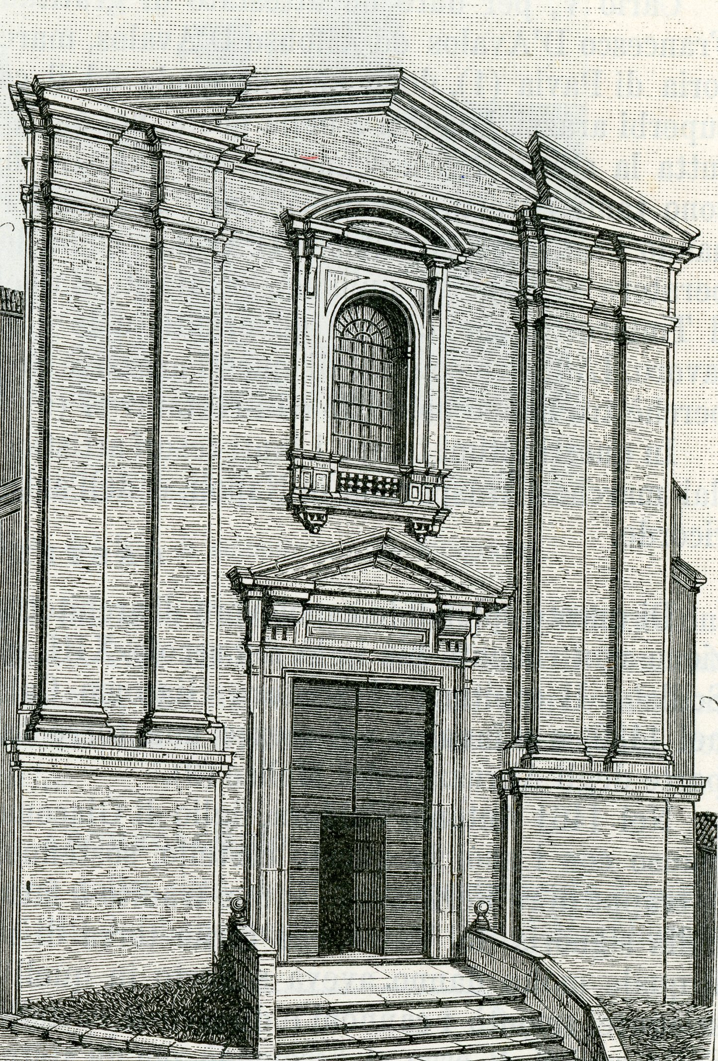 Vasto: chiesa del Carmine (incisore anonimo 1898).